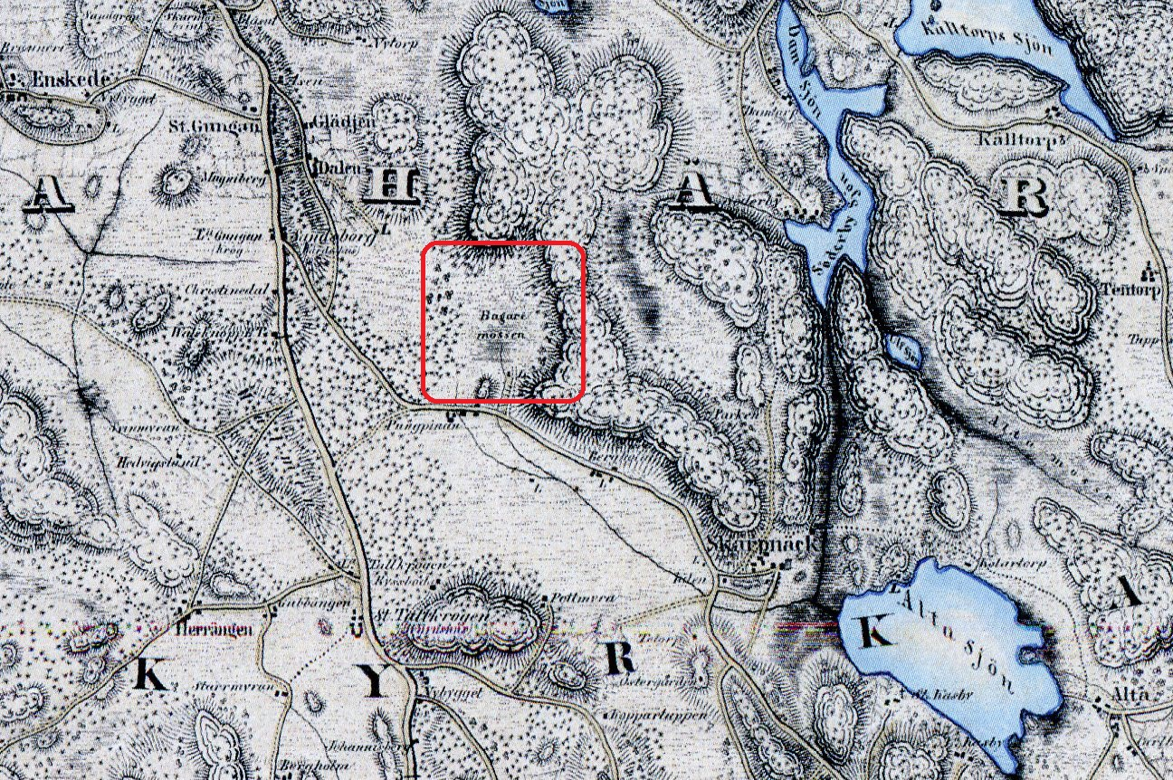 Del av karta Stockholm med omnejd av Carl Oscar Funck från 1846, topografiska kartor Sverige, III B 5, Krigsarkivet, Stockholm.